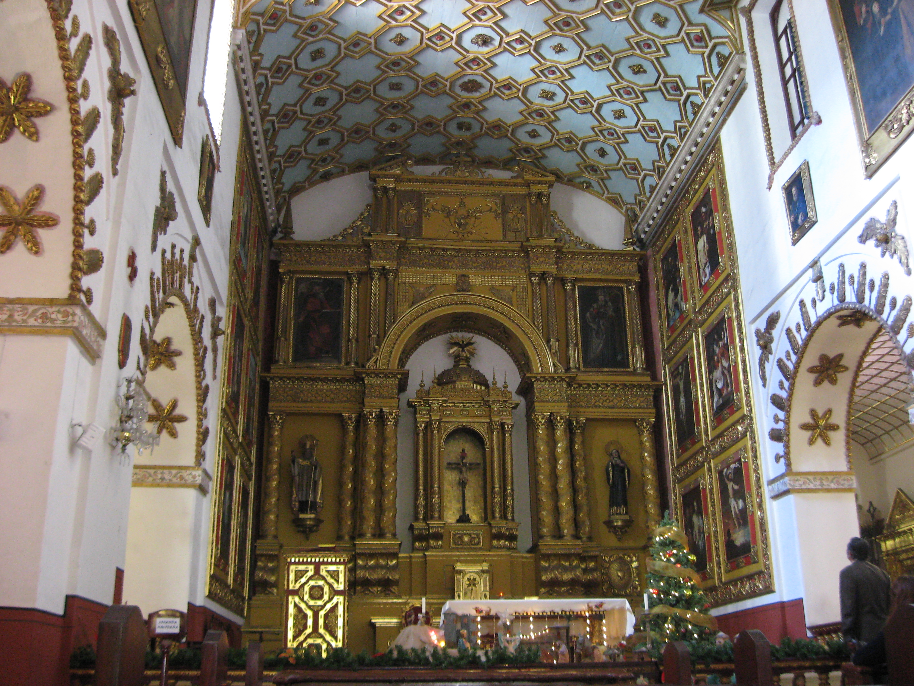 Iglesia de San Agustín, Bogotá. Colombia.